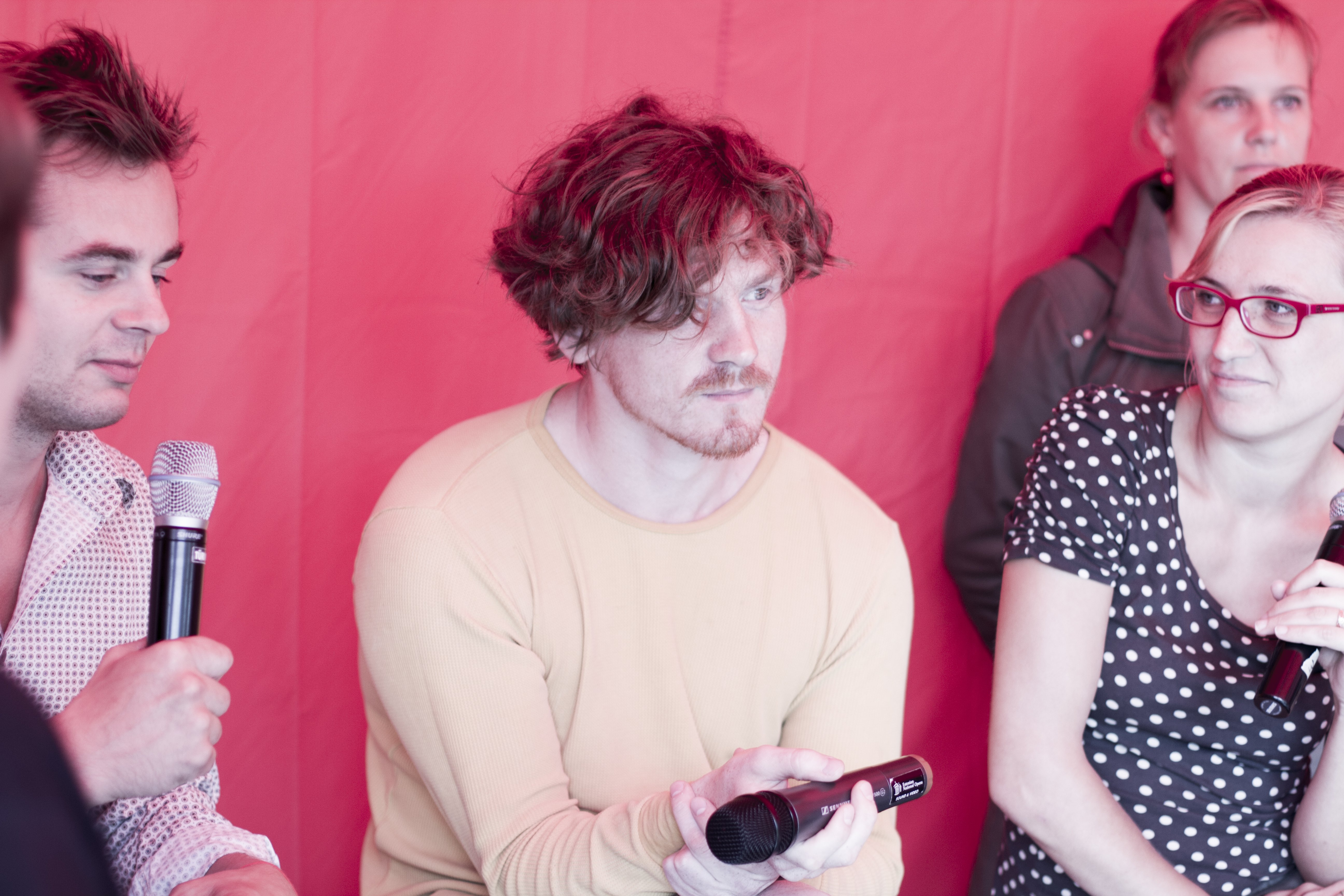 Arvamusfestival 2014